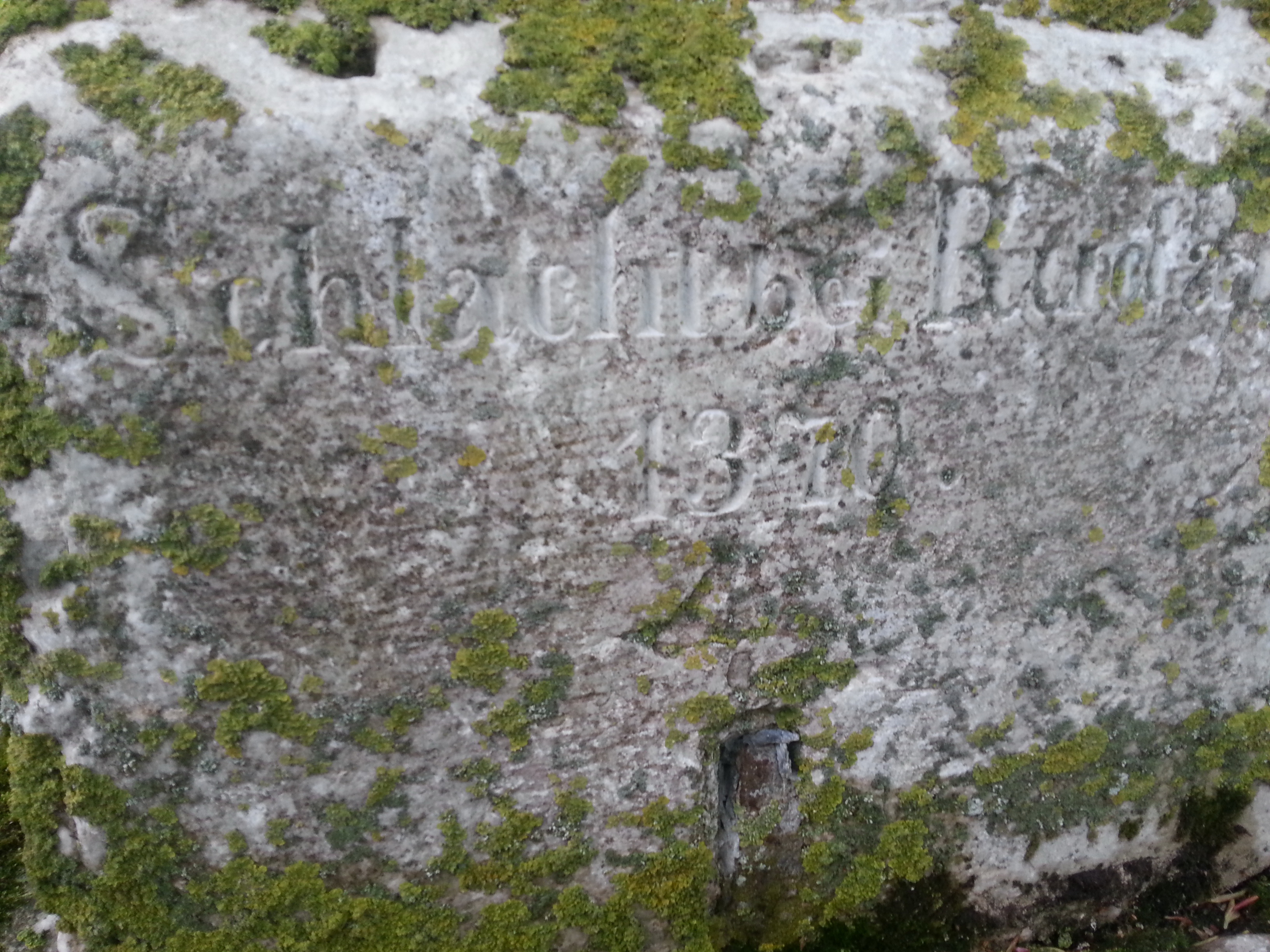 Надпись